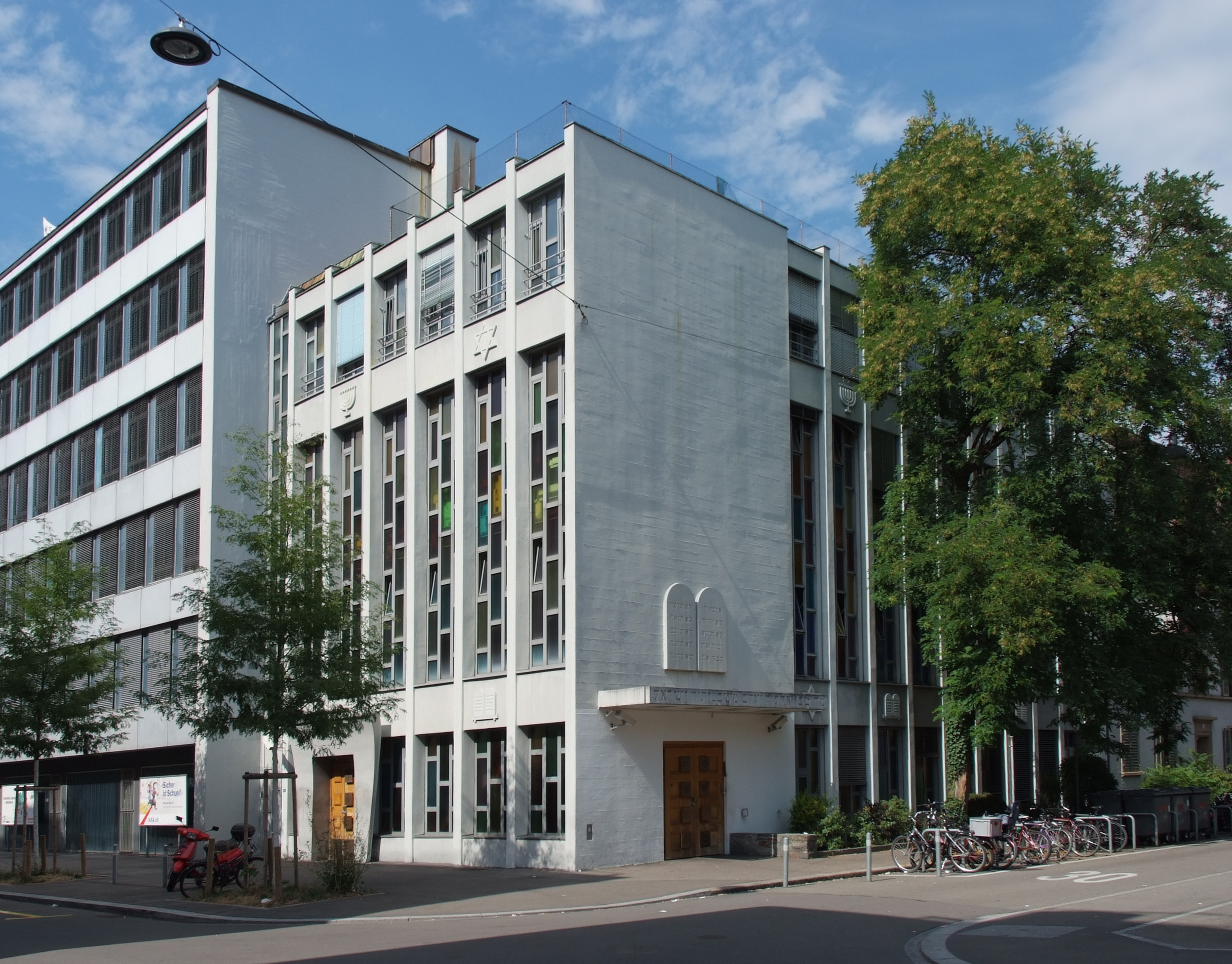 Synagoge Agudas Achim, Zürich, Gesamtansicht